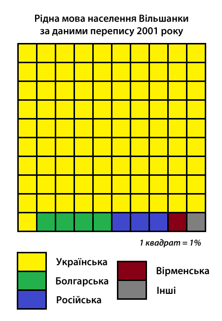 Інфографіка розподілу населення смт Вільшанка за рідною мовою згідно з даними перепису 2001 року. Джерело: Розподіл населення Кіровоградської області за рідною мовою (у % до загальної чисельності населення) за переписом 2001 року